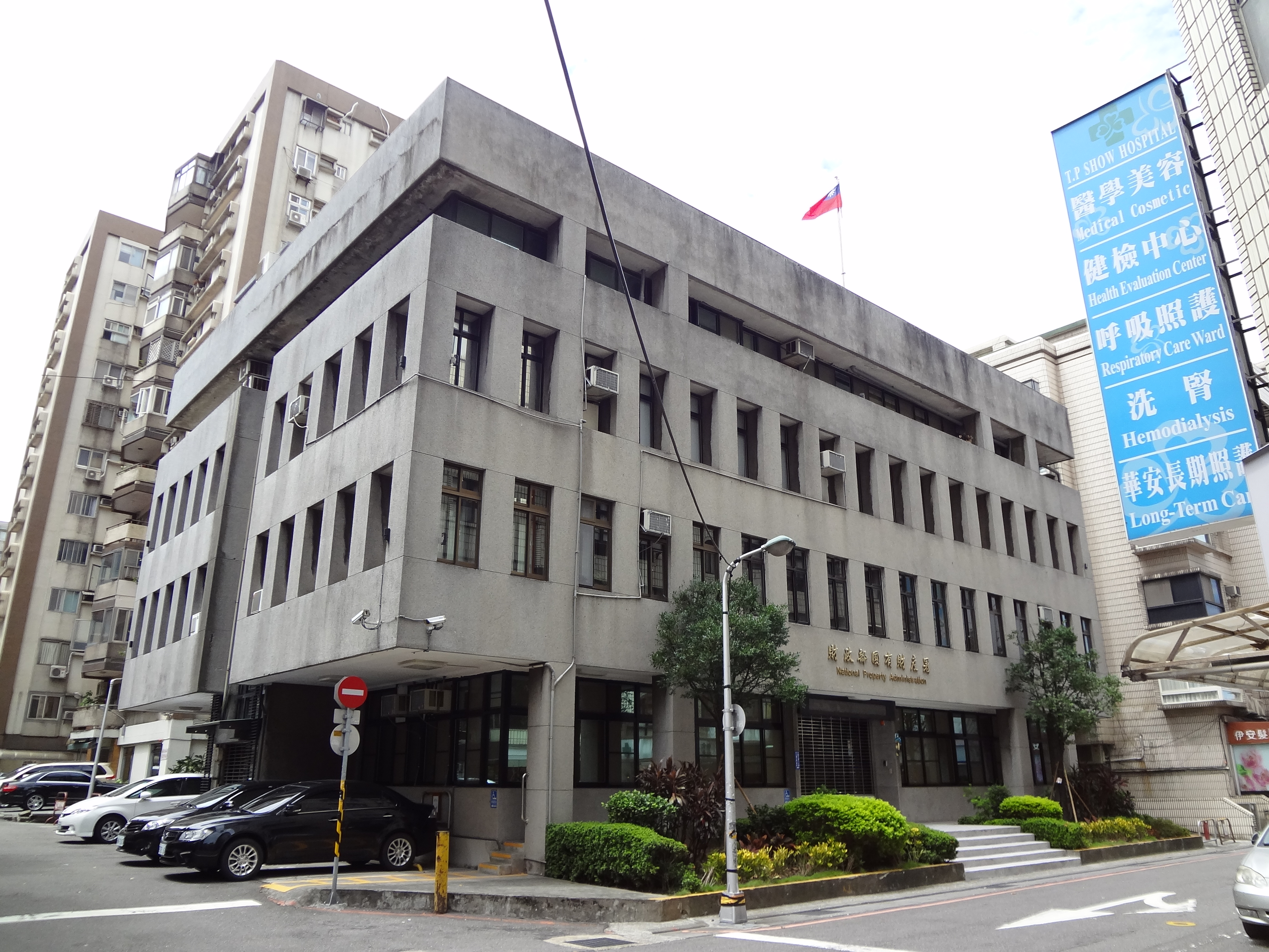 中華民國財政部國有財產署第一辦公室，位於臺北市大安區光復南路116巷18號。